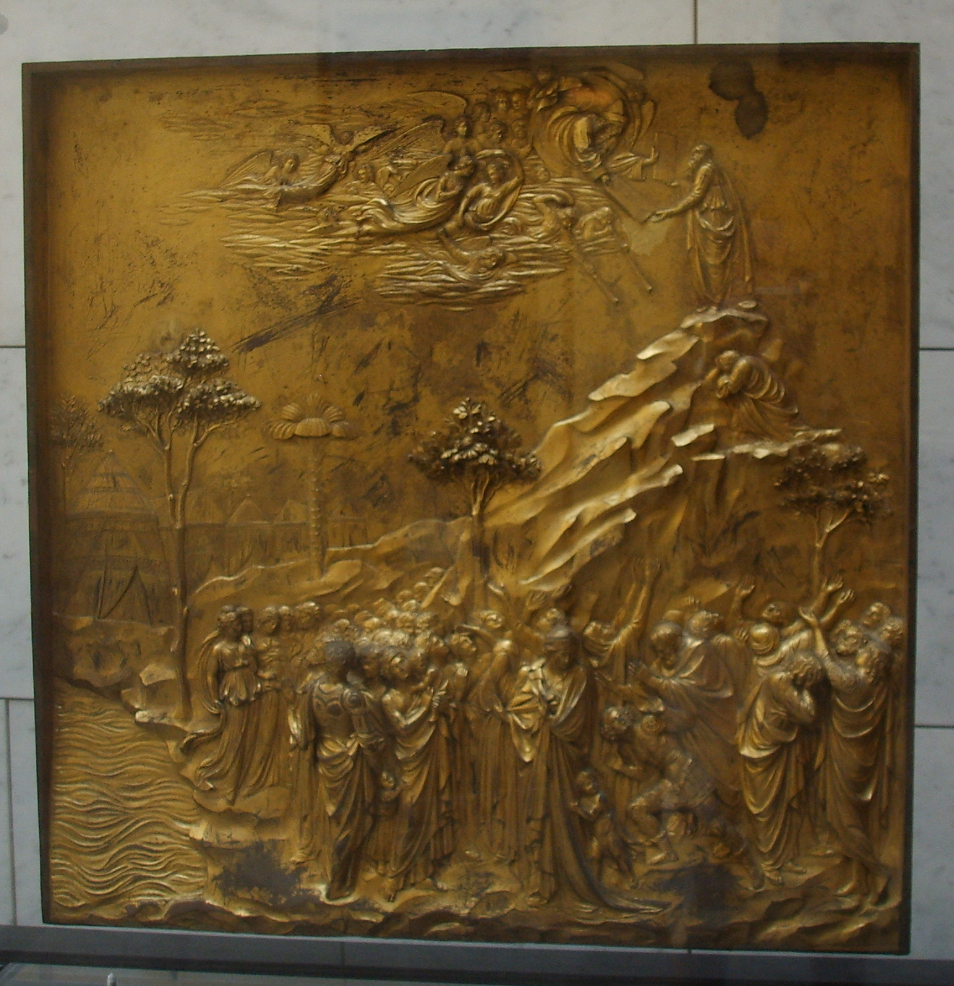 Formella battistero 7 Mosè